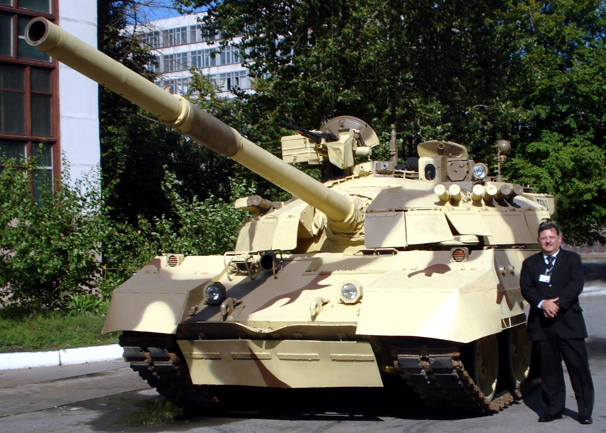 Ing Casanave y tanque Tifon-2